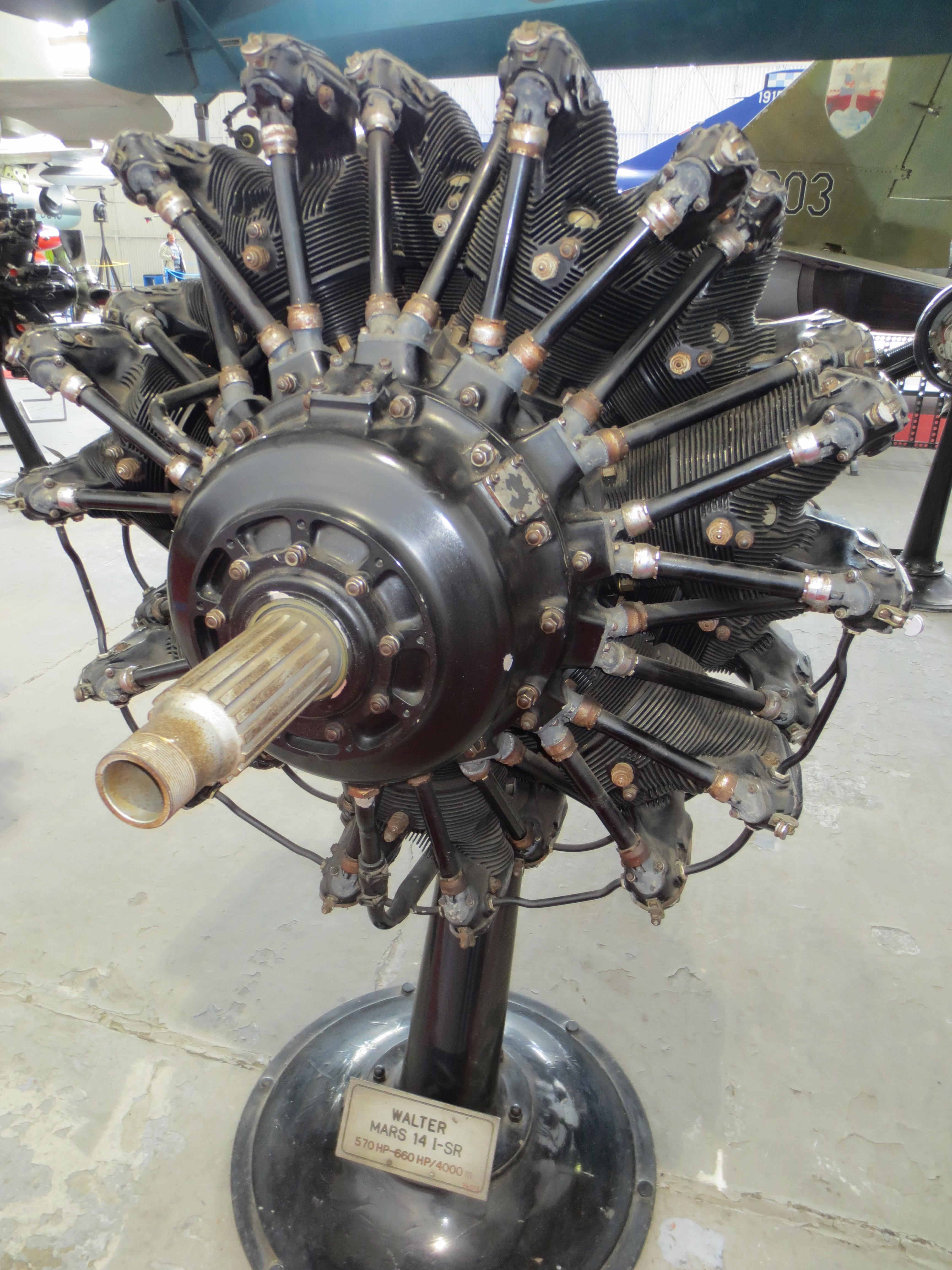 Walter Mars 14M, vzduchem chlazený dvouhvězdicový čtrnáctiválcový letecký motor s kompresorem